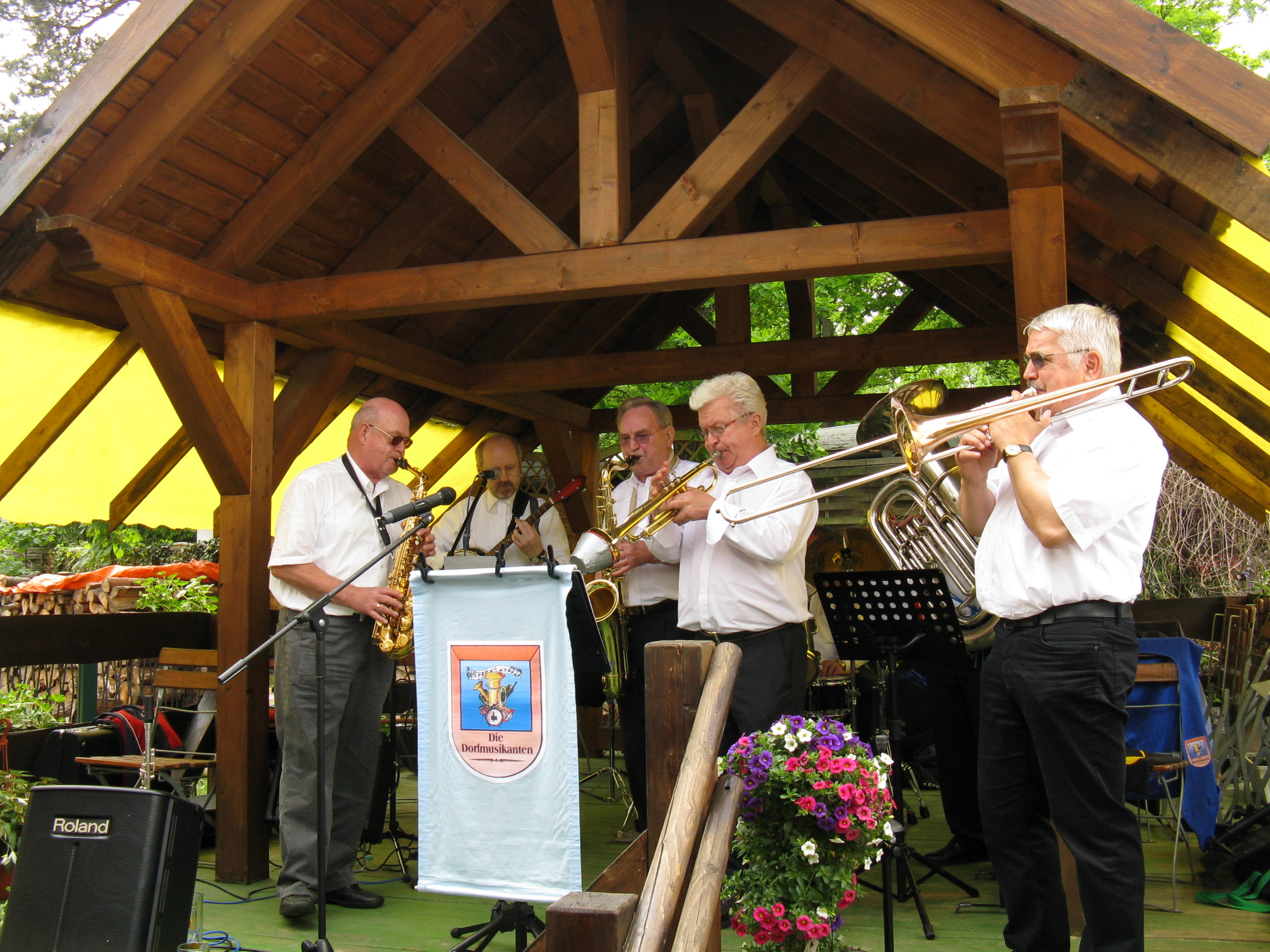 Die Dorfmusikanten vor der Bauernschenke in Eggersdorf